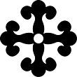 花久留子